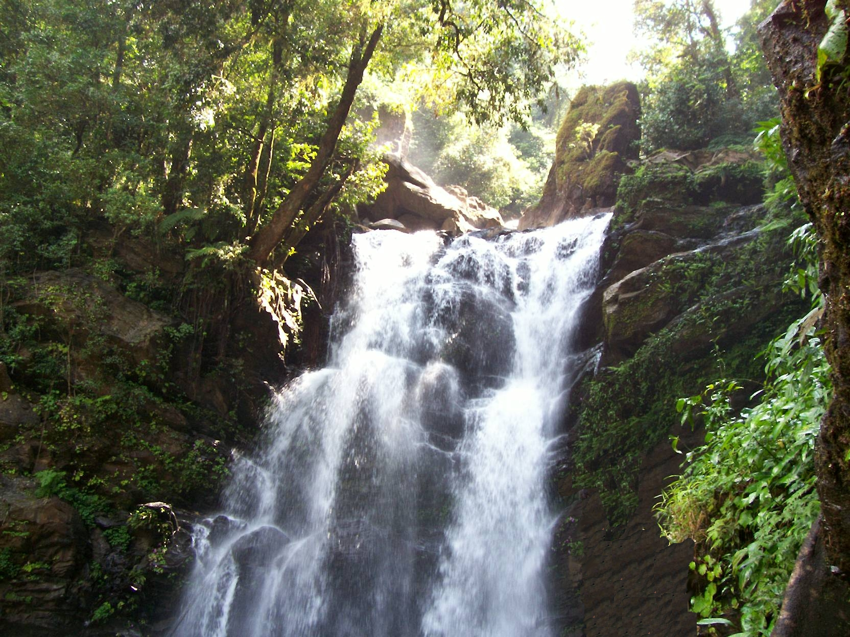 Hanumana Gundi Falls in Kudremukh national park, Karnataka.